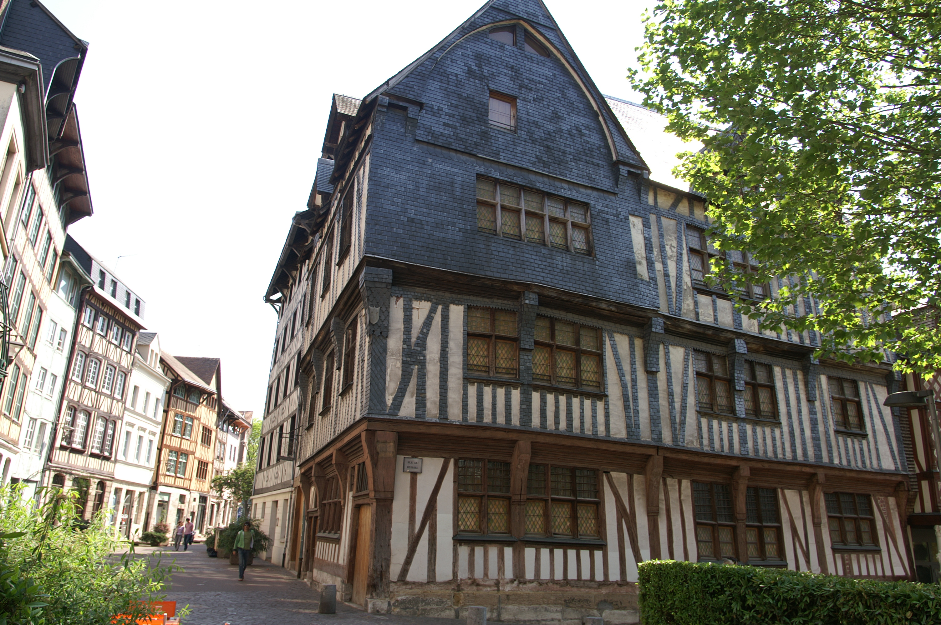 Maison des Quatre-fils-Aymon, actuel Musée national de l'Éducation, 185 rue Eau de Robec à Rouen. Façade sur la rue du Ruissel.